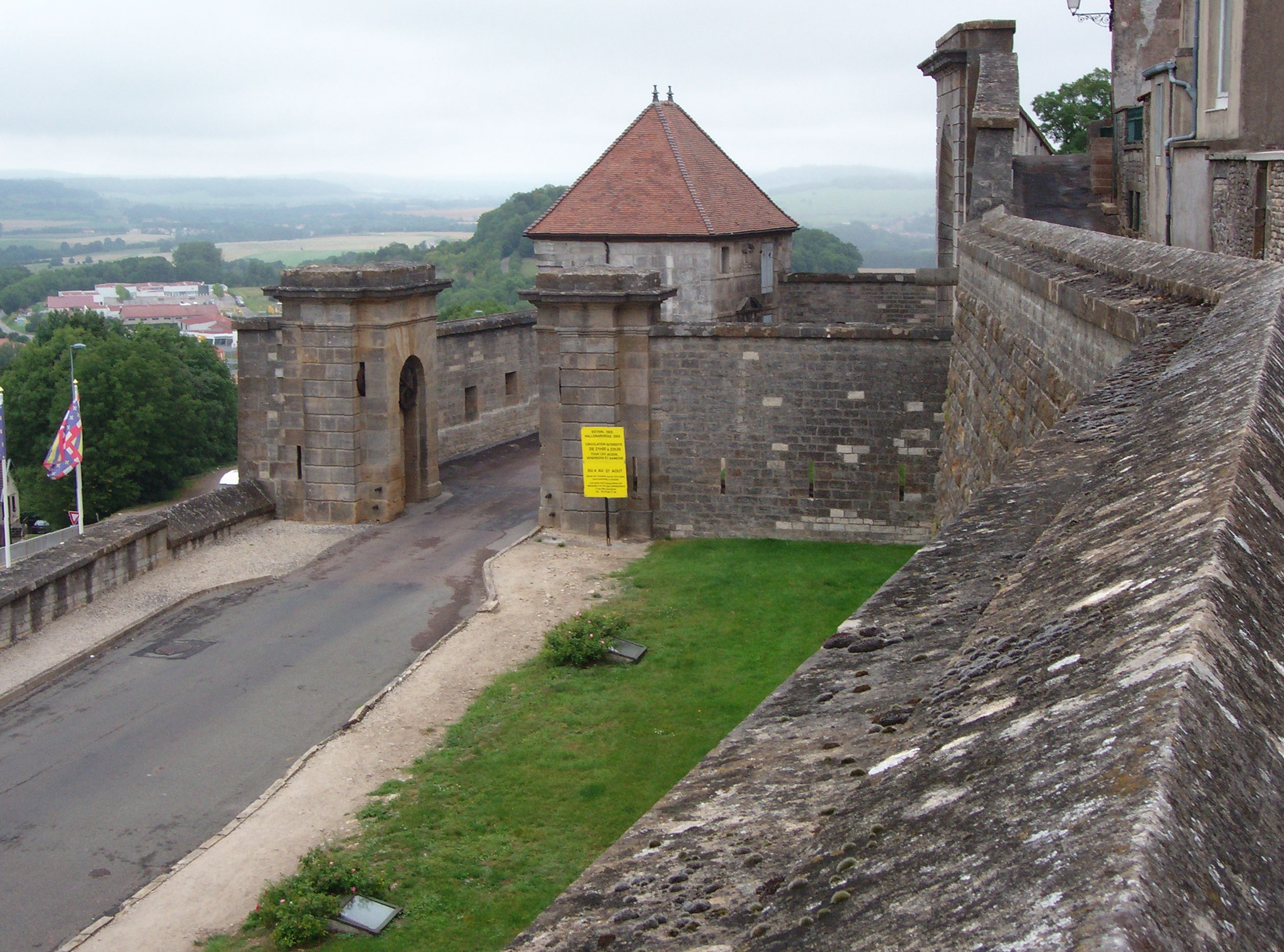 Langres, Porte de l'Hotel de Ville